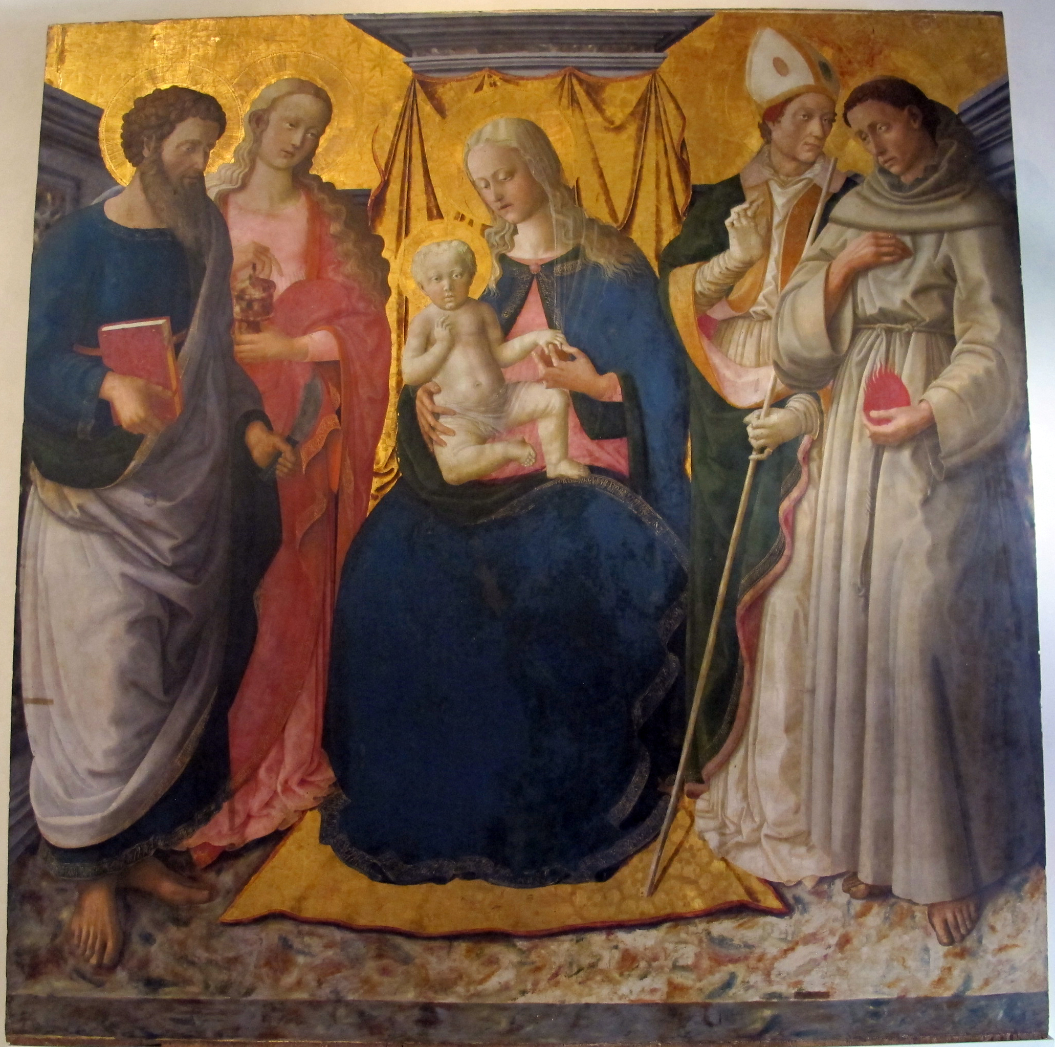 Museo nazionale di Villa Guinigi - MIBAC This is a photo of a monument which is part of cultural heritage of Italy.